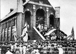 ਪੰਜਾਬੀ: ਗੁਰਦਵਾਰਾ ਉਦਘਾਟਨ ਵੇਲੇ ਸੰਗਤ ਦਾ ਇਕੱਠ ਦਰਸਾਇਆ ਹੈ